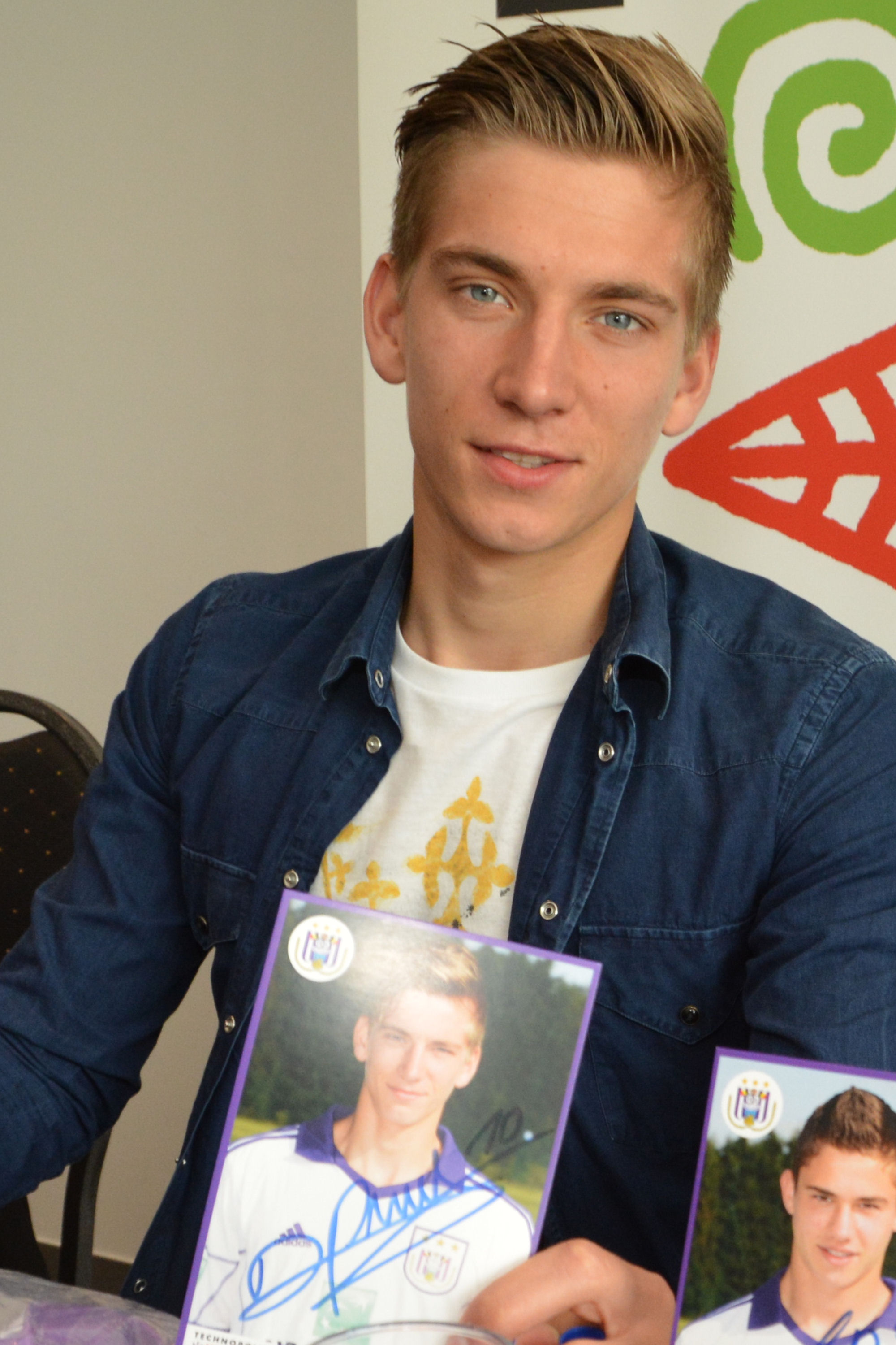 Dennis Praet, voetballer bij RSC Anderlecht tijdens een signeersessie in het Doe-centrum Technopolis Mechelen